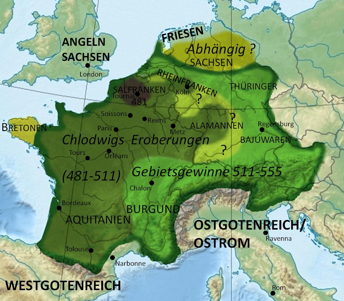 Expansion des Merowingischen Frankenreichs vom Regierungsantritt Chlodwigs (481) bis zum Tod Theudebalds (555), einschließlich vermutlich abhängiger Gebiete Nachweise: Eugen Ewig: Die Merowinger und das Frankenreich. Kohlhammer Verlag, Fünfte aktualisierte Auflage 2006. Matthias Springer: Die Sachsen. Kohlhammer, Stuttgart 2004, ISBN 3-17-016588-7. Dieter Geuenich: Geschichte der Alemannen. 2., überarbeitete Auflage, Kohlhammer, Stuttgart 2005, ISBN 978-3-17-018227-1.